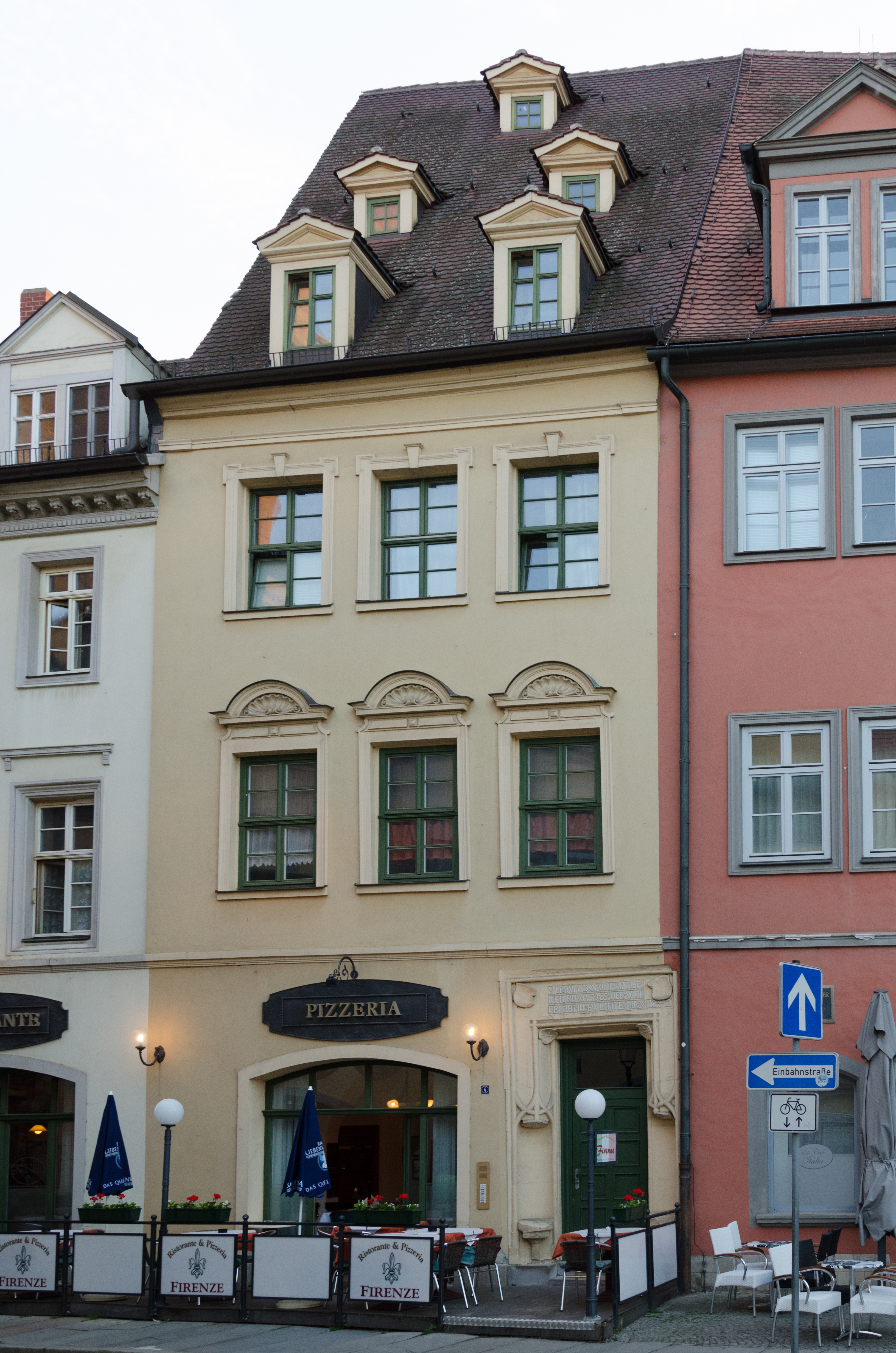 Naumburg, Markt 4